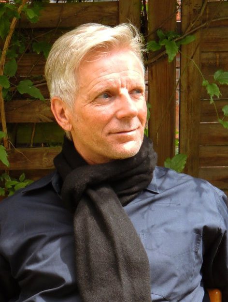 Der Autor Mathias Wünsche in seinem Garten in Siegburg.